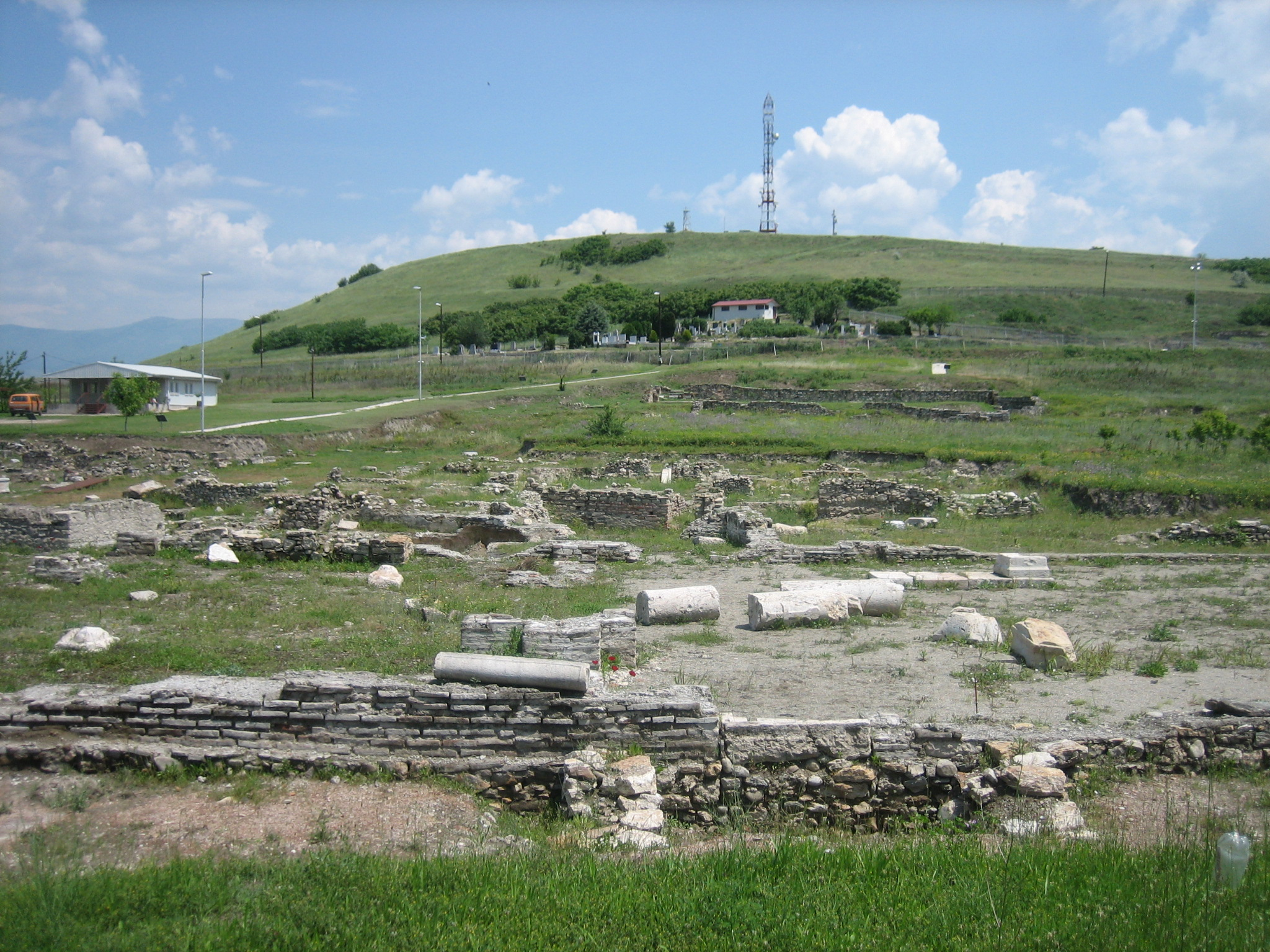 Scupi near Skopje, Macedonia